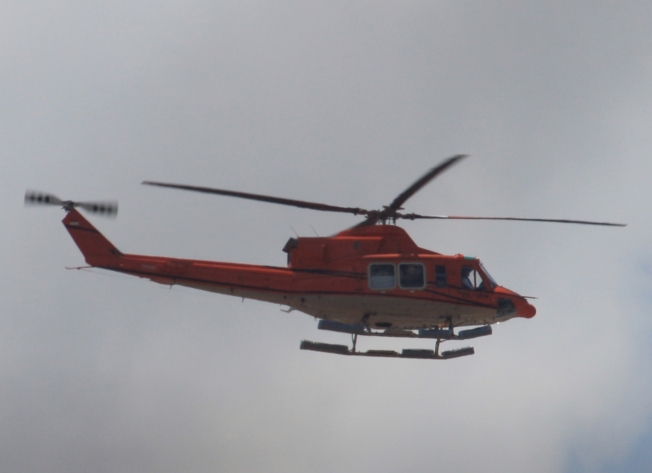 Denpasar / Bali - Ngurah Rai International (DPS / WADD) Indonesia, August 17, 2012.